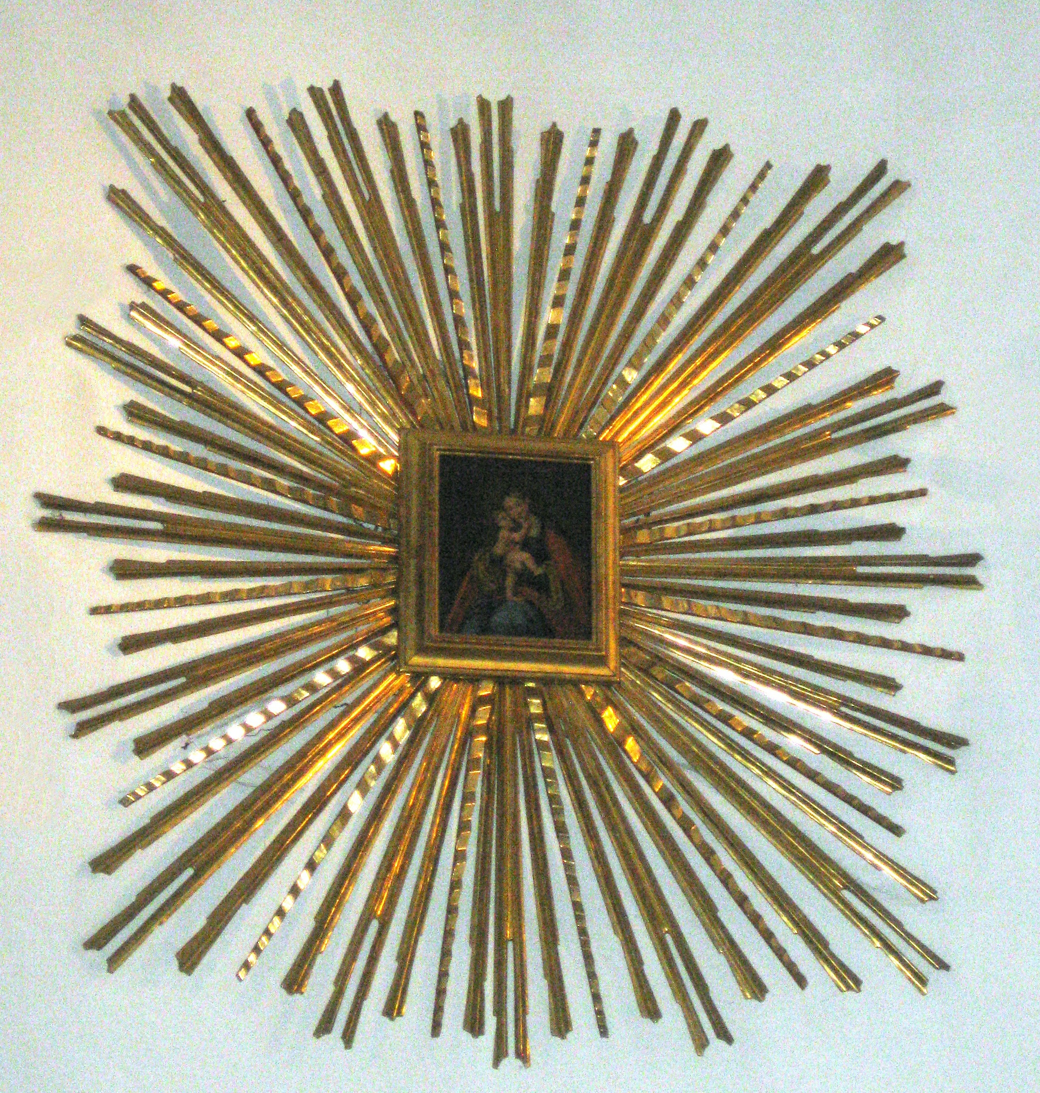 Gnadenbild, 1735 oder früher, Kopie nach Lucas Cranach